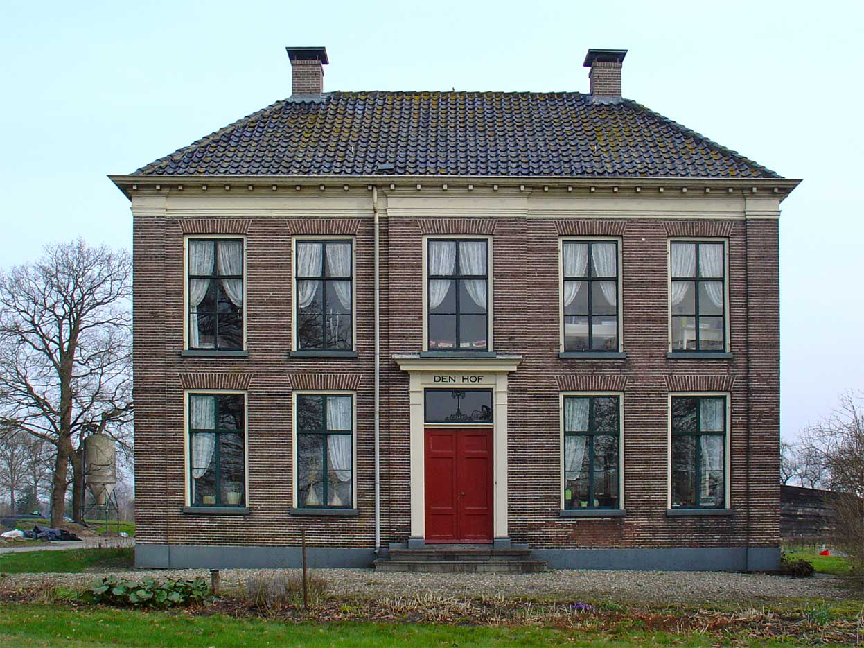 Den Hof aan de Commissieweg nabij de Wijk